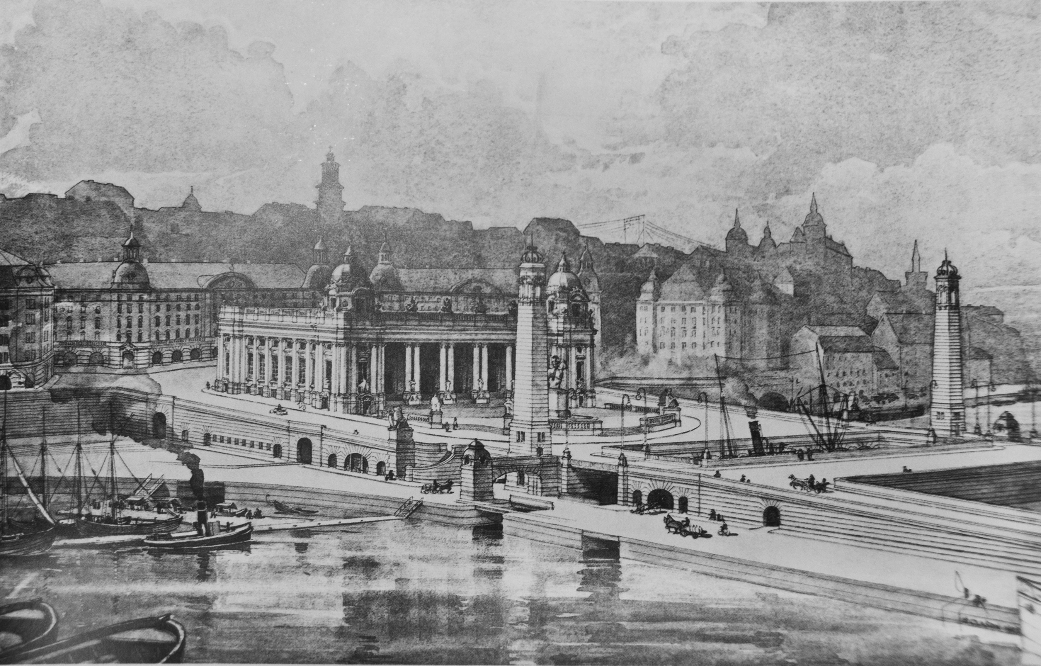 Förslag till dubbla uppfartsvägar och ett nytt Slussenomåde. Akvarell av Isak Gustaf Claeson